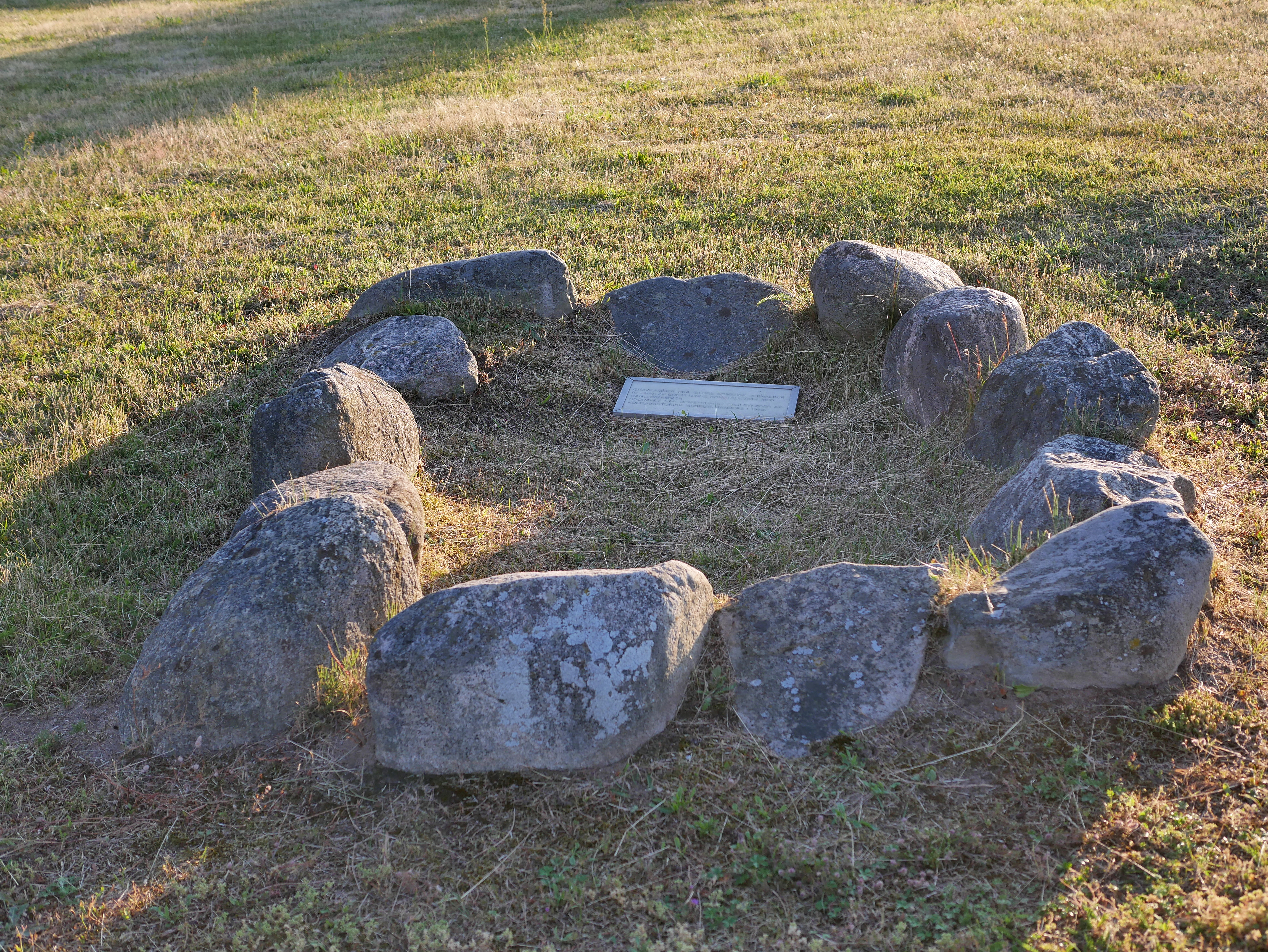 Steinkistengräber in Havndal - Grab 1 Die erste ist eine Steinkiste von der für Ostjütland typischen Art. Sie ist Ost-West-orientiert, besteht aus 13 großen Granitsteinen und misst im Inneren 2,1 × 1,4 m. Von den Bestattungen wurden keine Spuren gefunden. Die Grabbeigaben bestehen im Wesentlichen aus acht zerscherbten Gefäßkeramiken mit und ohne Verzierung. Darunter waren Vasen, Schüsseln, eine Schale, ein Teller und zwei andere Behältnisse sowie zwei eiserne Messer.